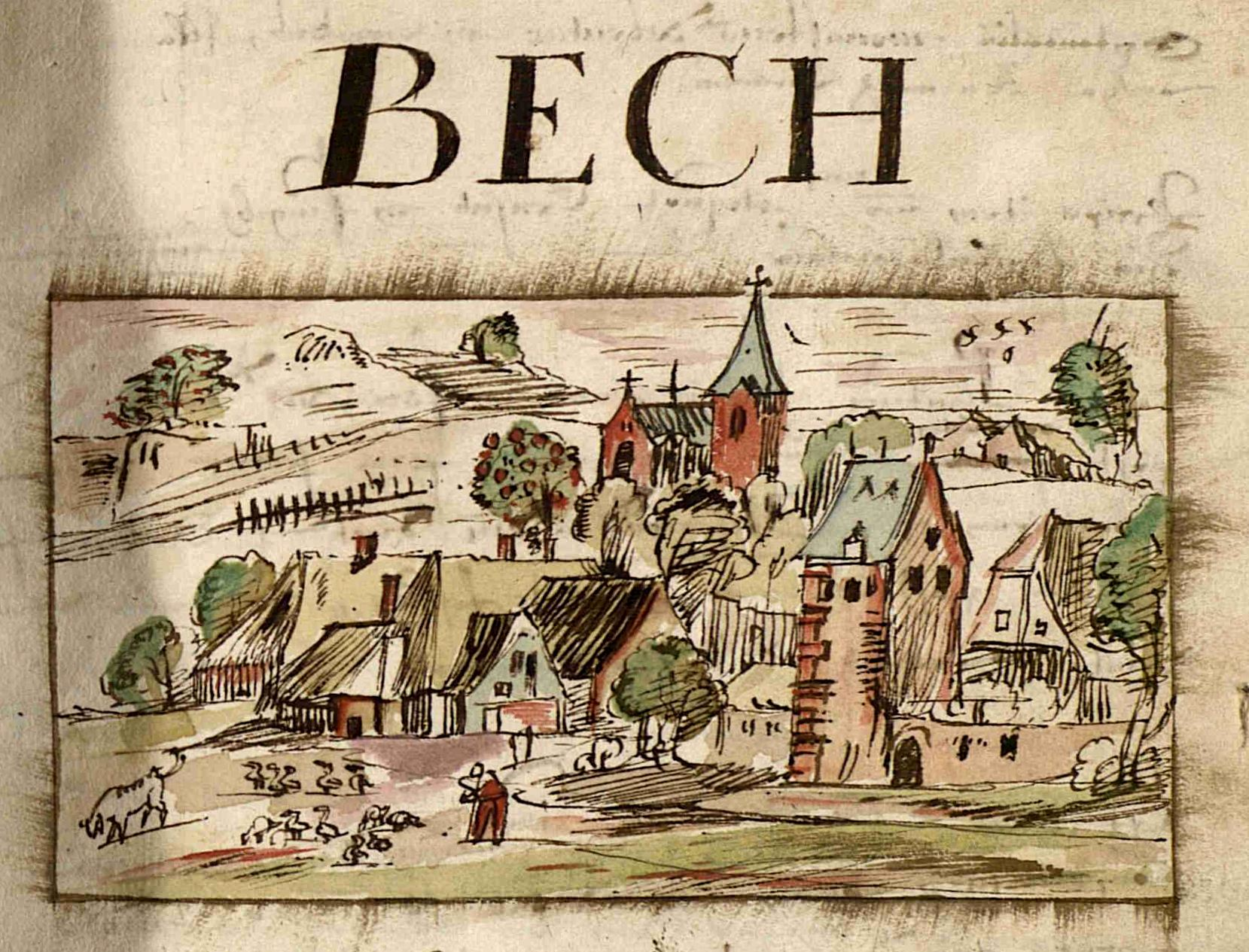 "Bech" par Jean Bertels, fol. 27 du Registre des biens de l'abbaye Saint-Willibrord d'Echternach.